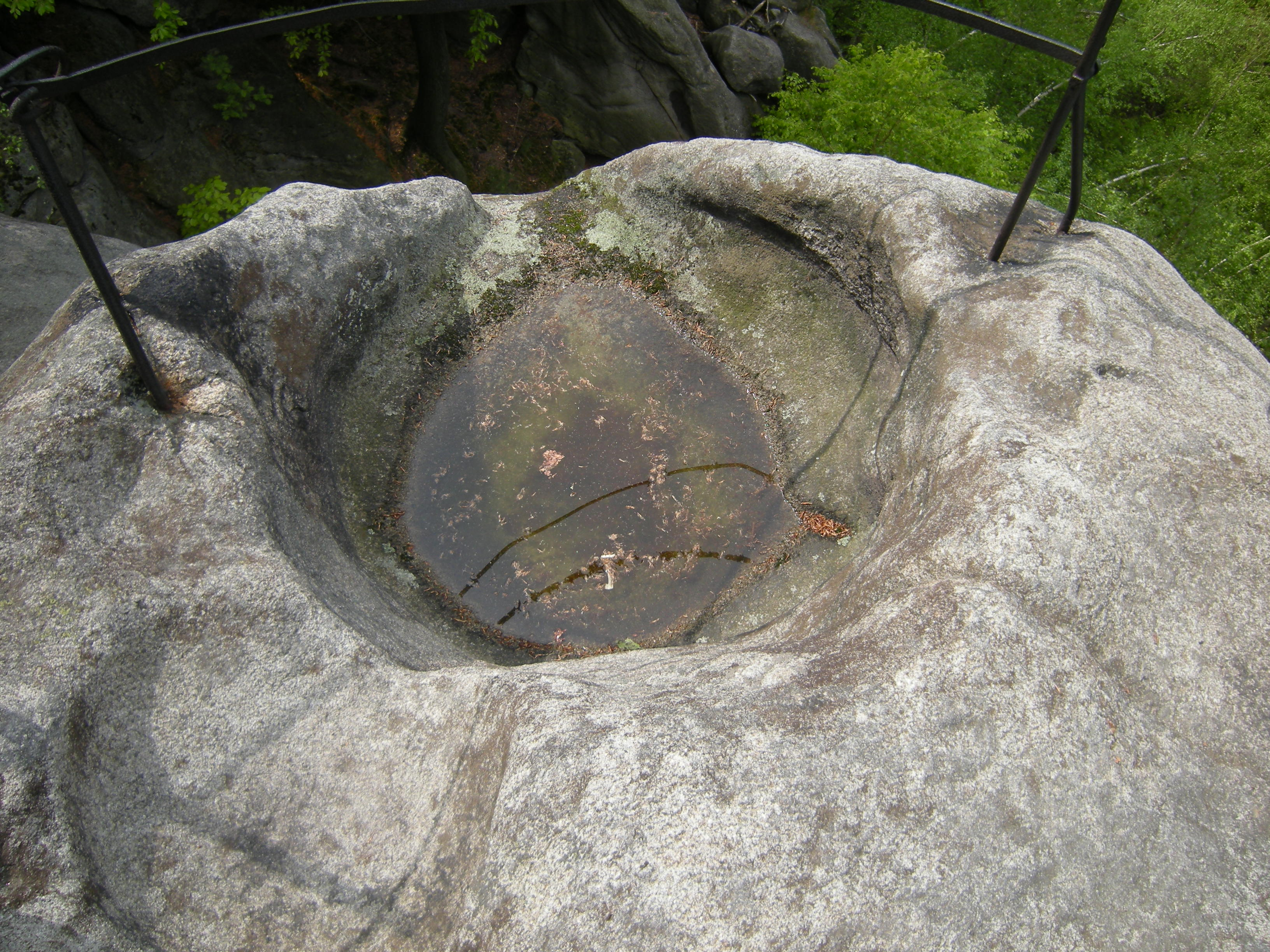 Skałki Venušiny misky na wzniesieniu Smolny vrch